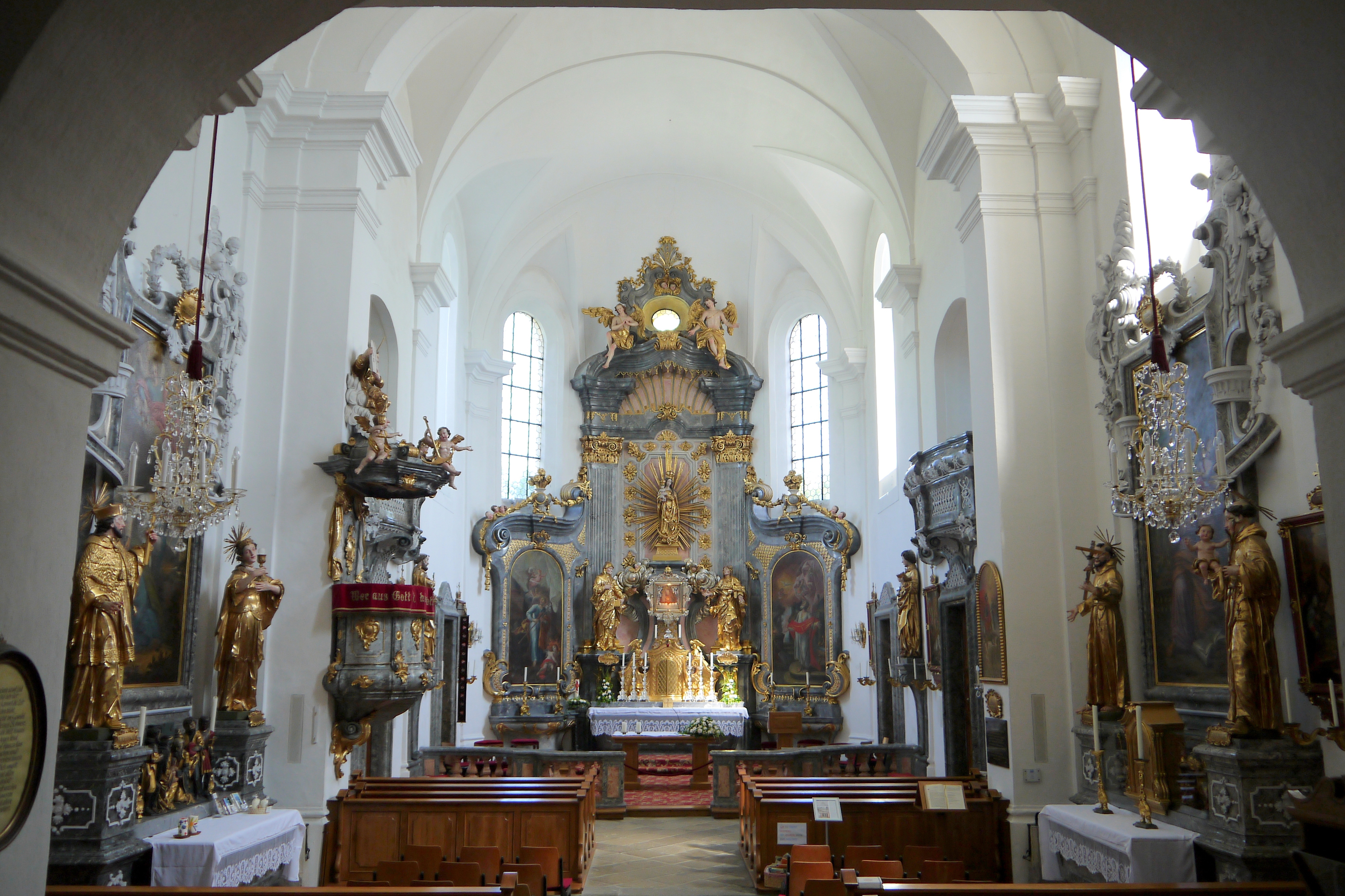 Kath. Pfarrkirche Mariä Himmelfahrt